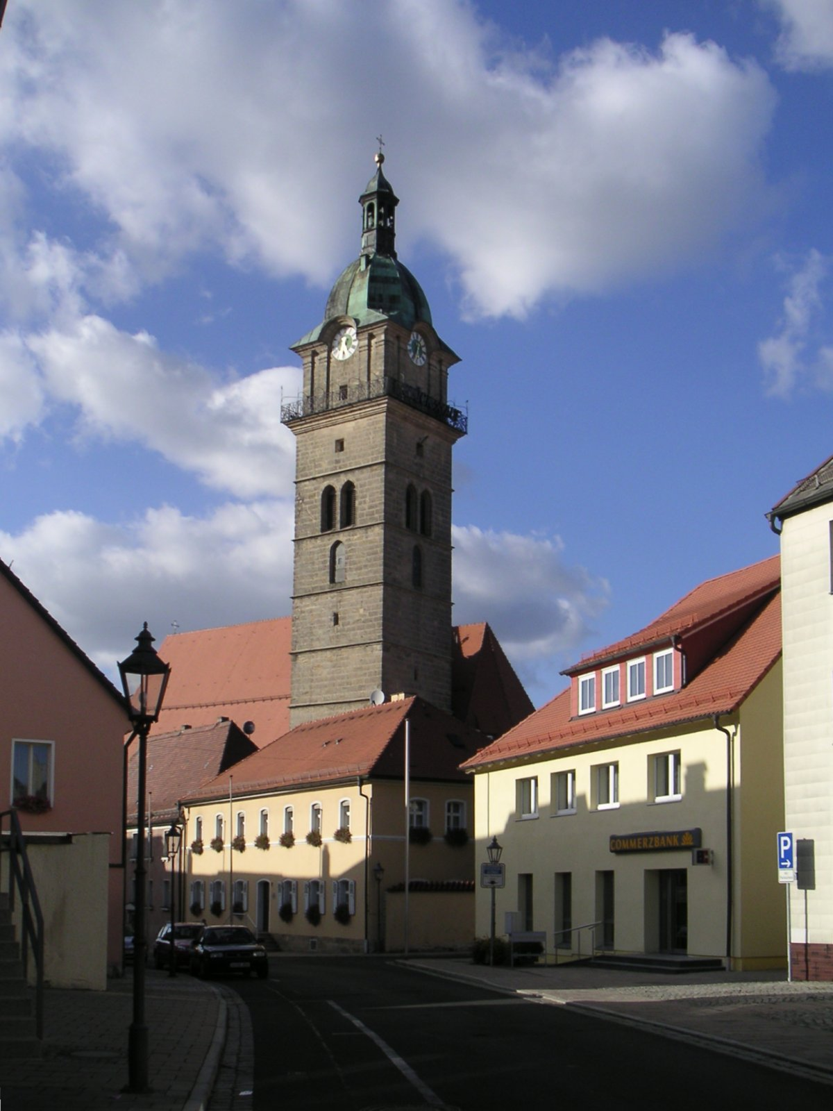 Turm der Kirche St. Johannes der Täufer in Auerbach/Opf